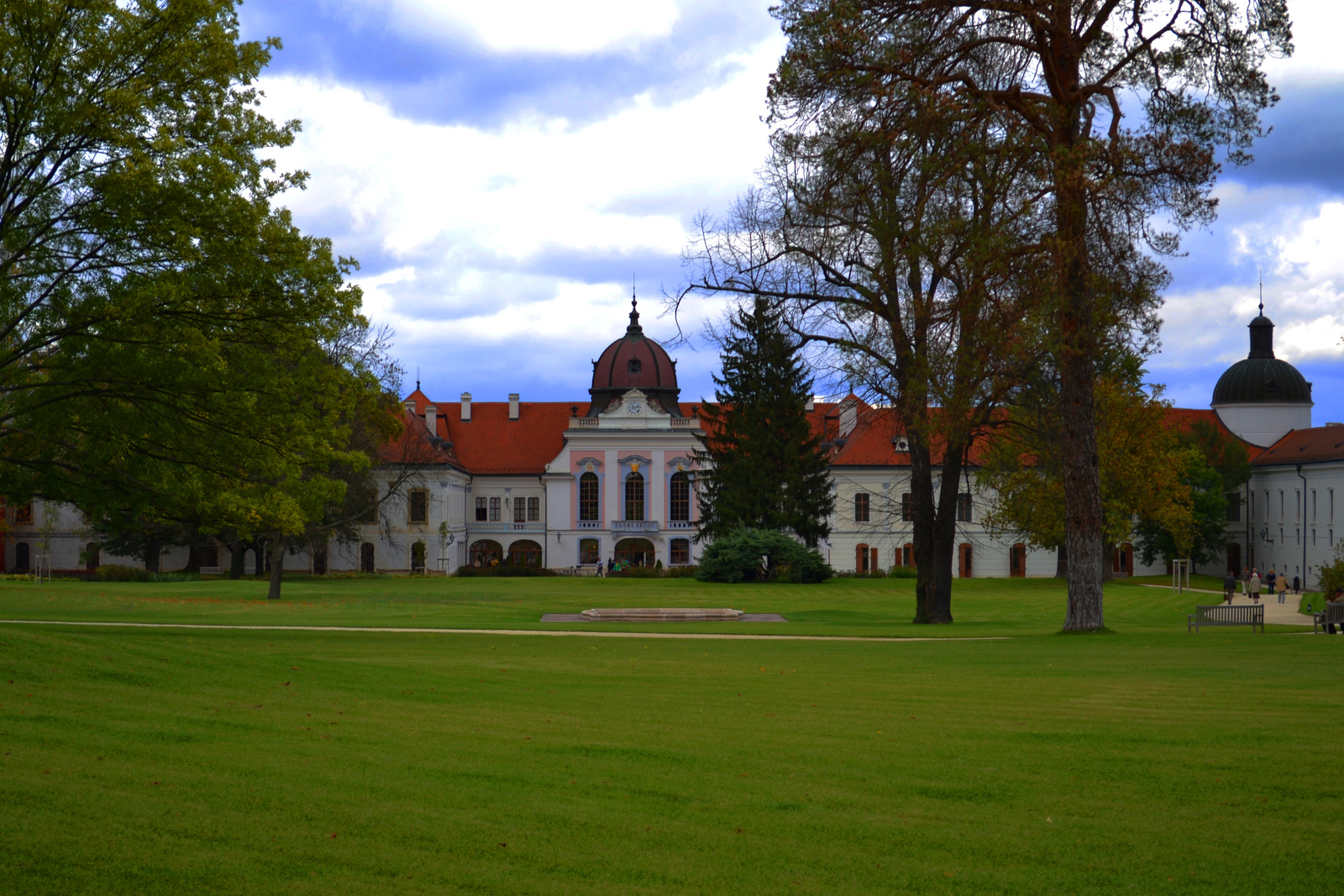 Grassalkovich-kastély (Gödöllő, Martinovics utca 16.) This is a photo of a monument in Hungary, Identifier: 7051